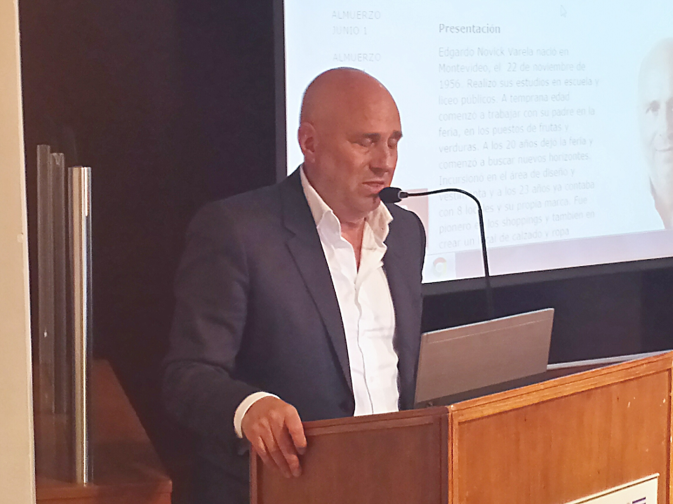 Edgardo Novick disertando en el Club Uruguayo Británico el 3 de agosto de 2016.